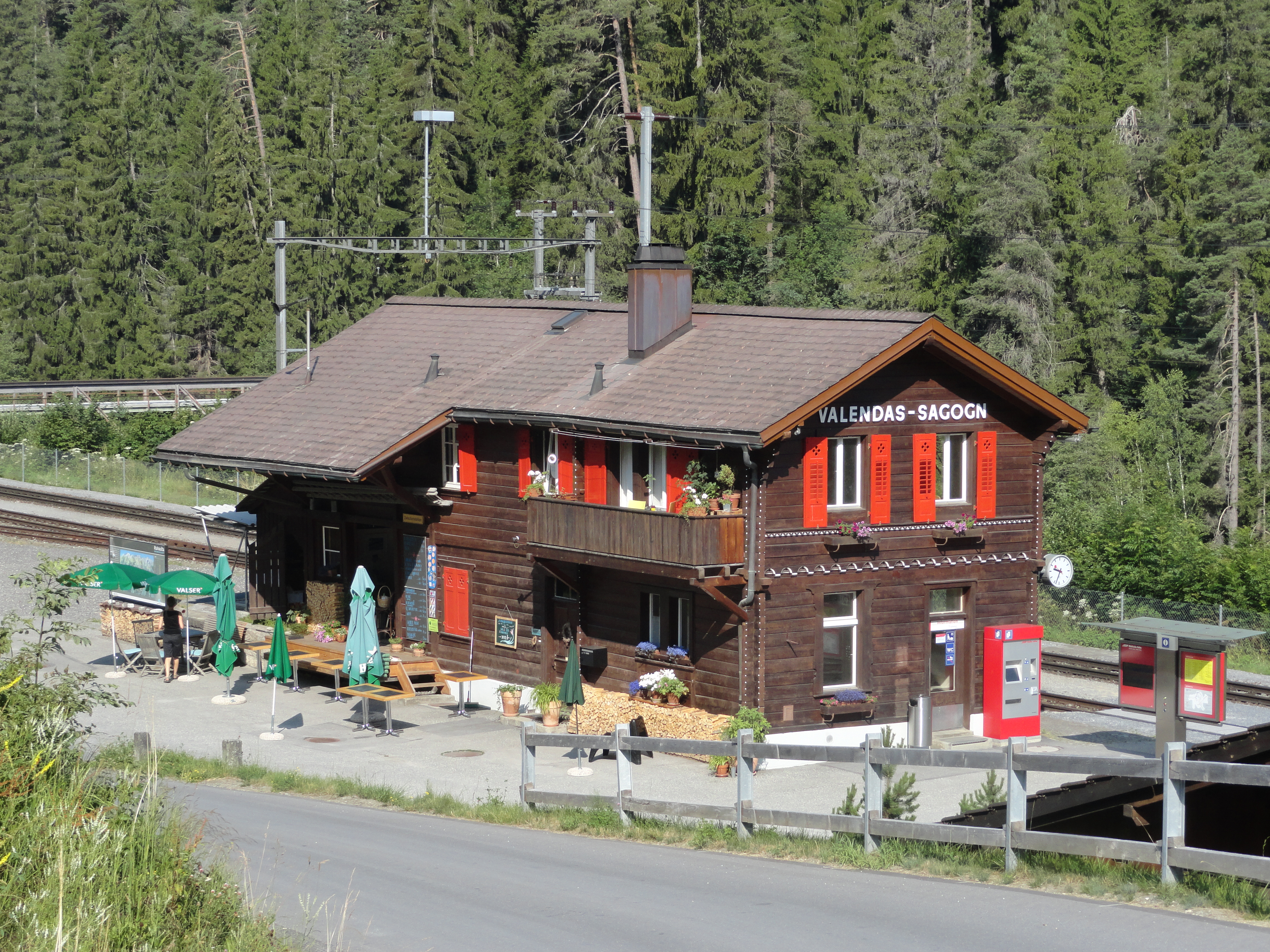 Station Valendas-Sagogn